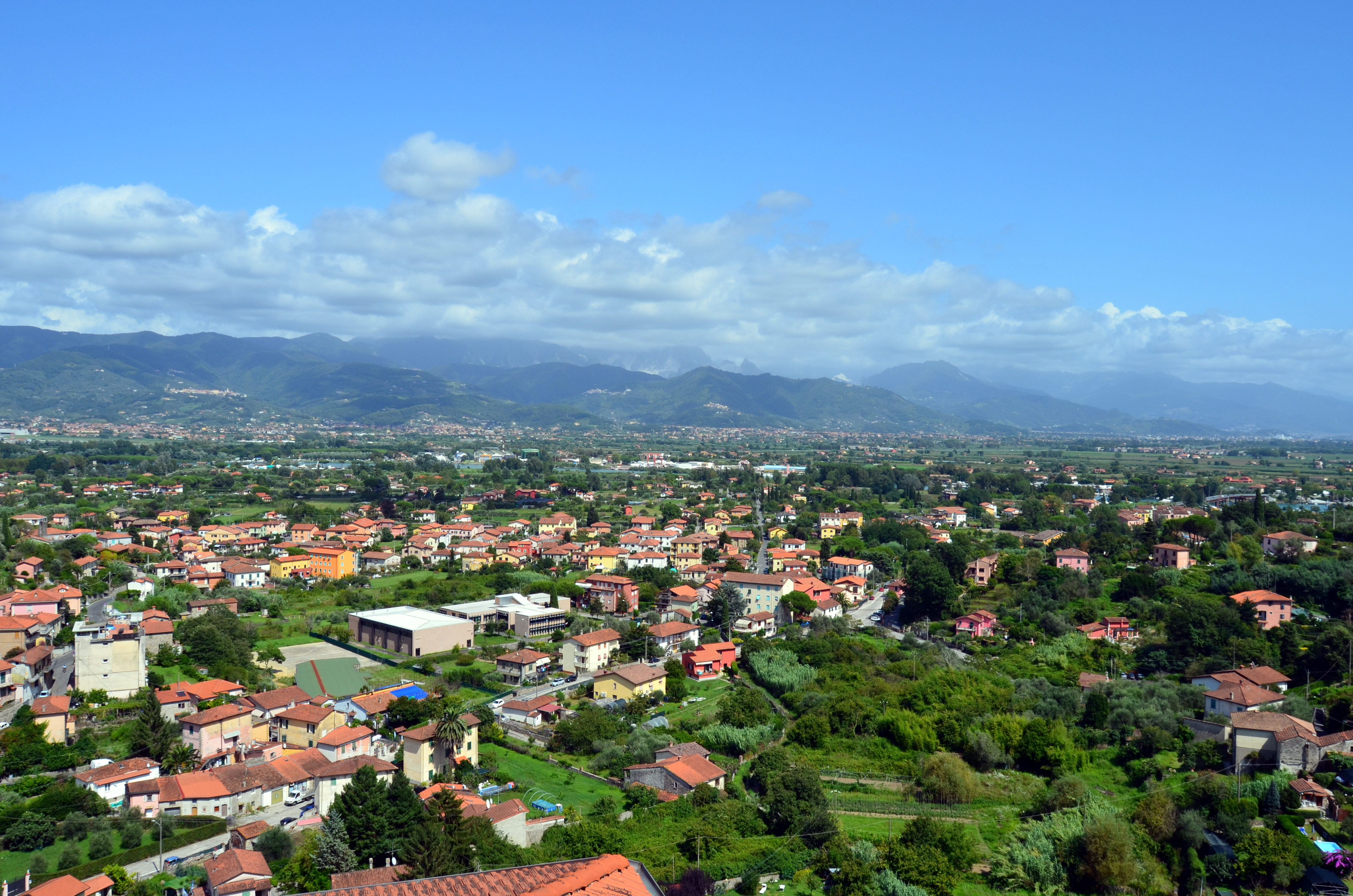 Serie di immagini del borgo vecchio di Ameglia, Liguria, Italia